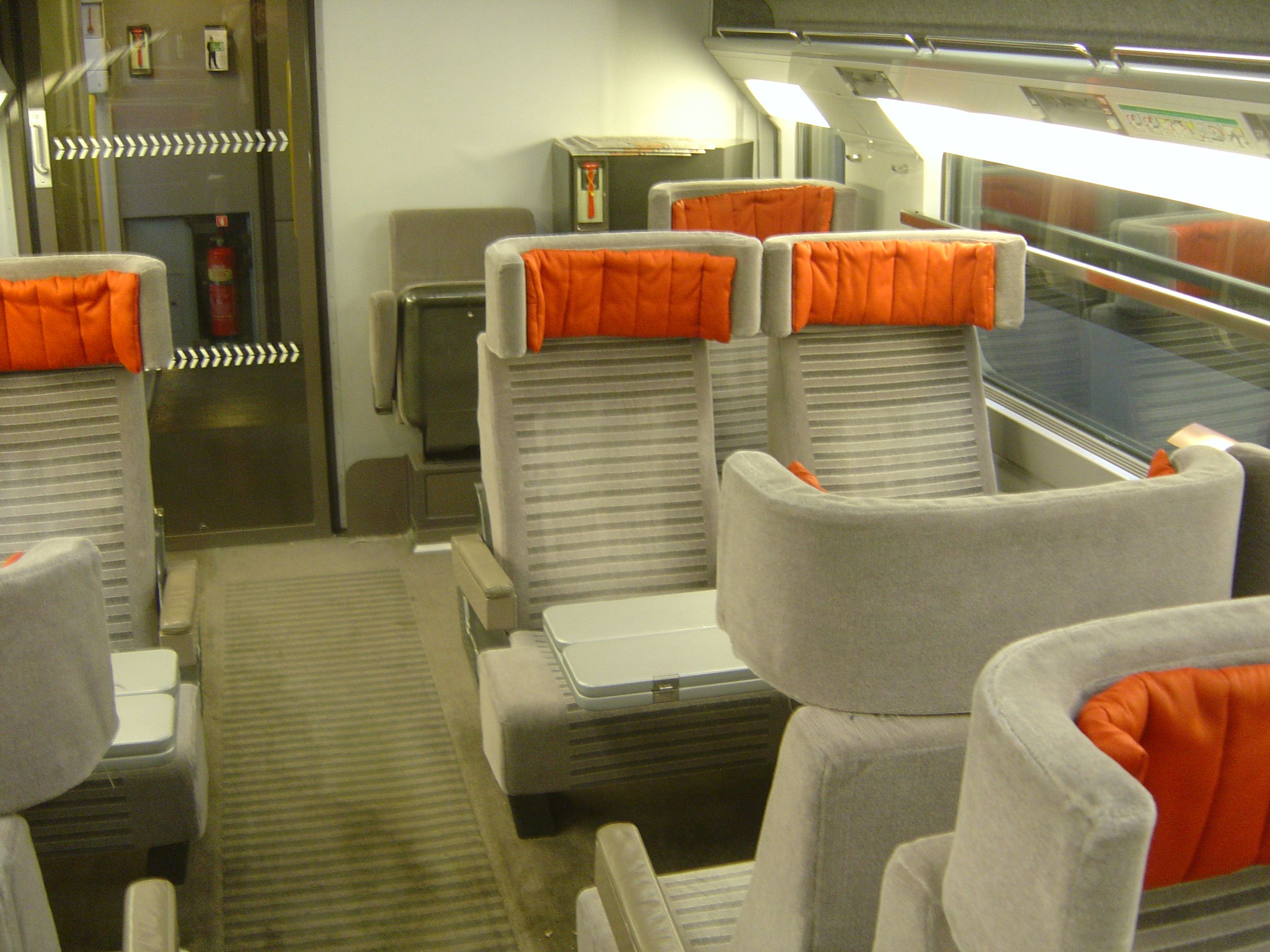 Eurostar Leisure Select Seats